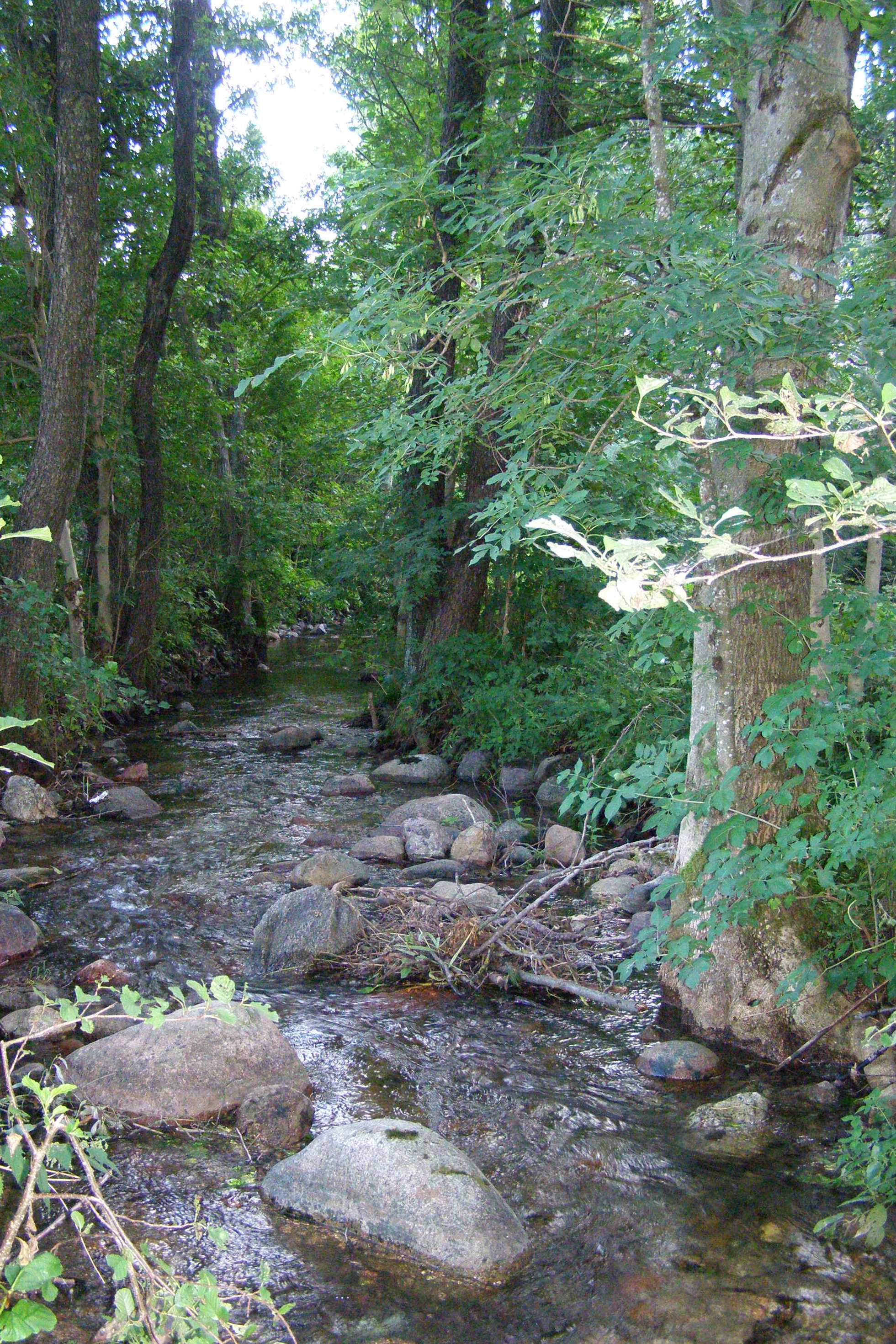 Czarna Hańcza - koryto przy ujściu z Hańczy